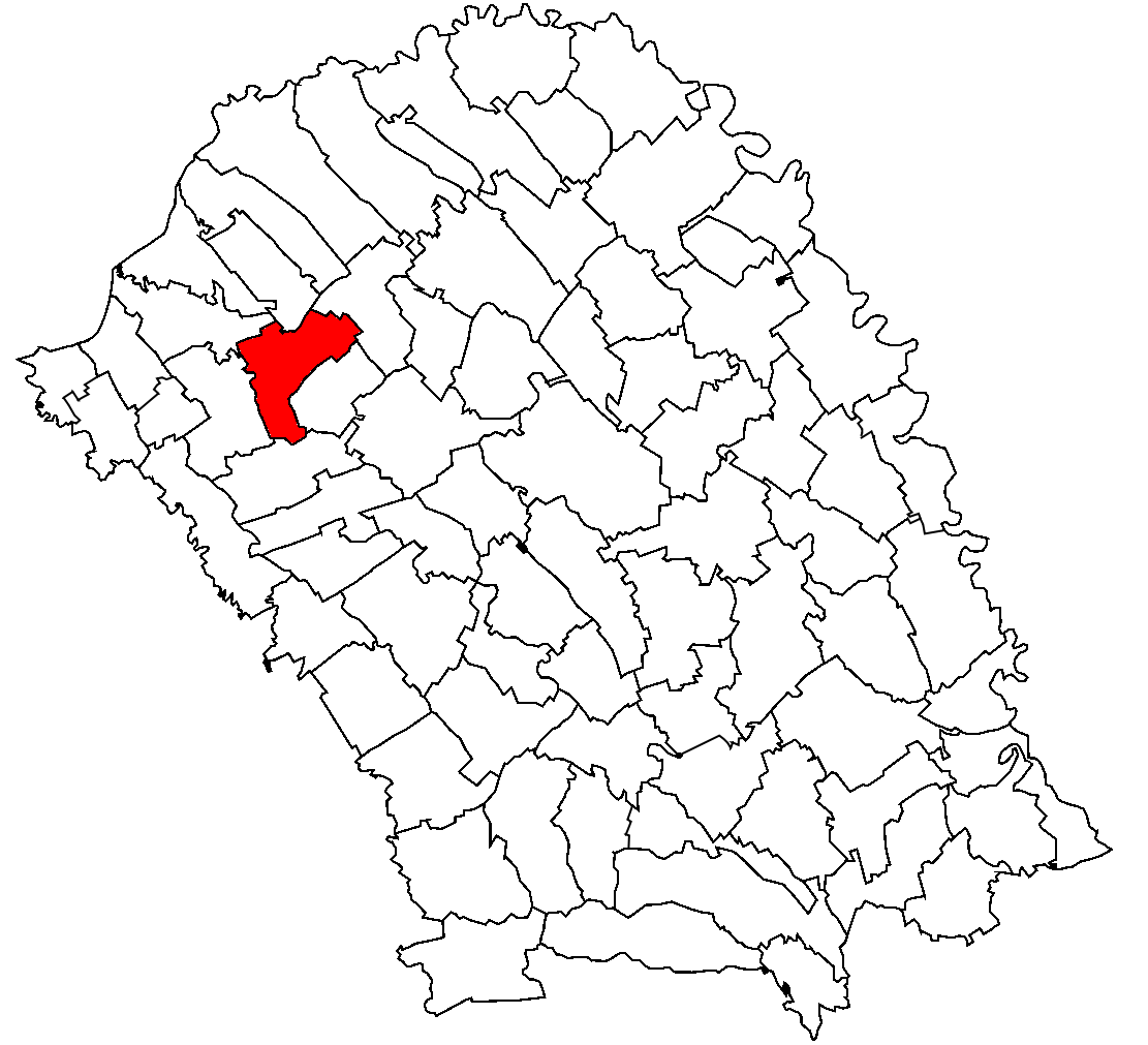 Categorie:Hărţi ale judeţului Botoşani